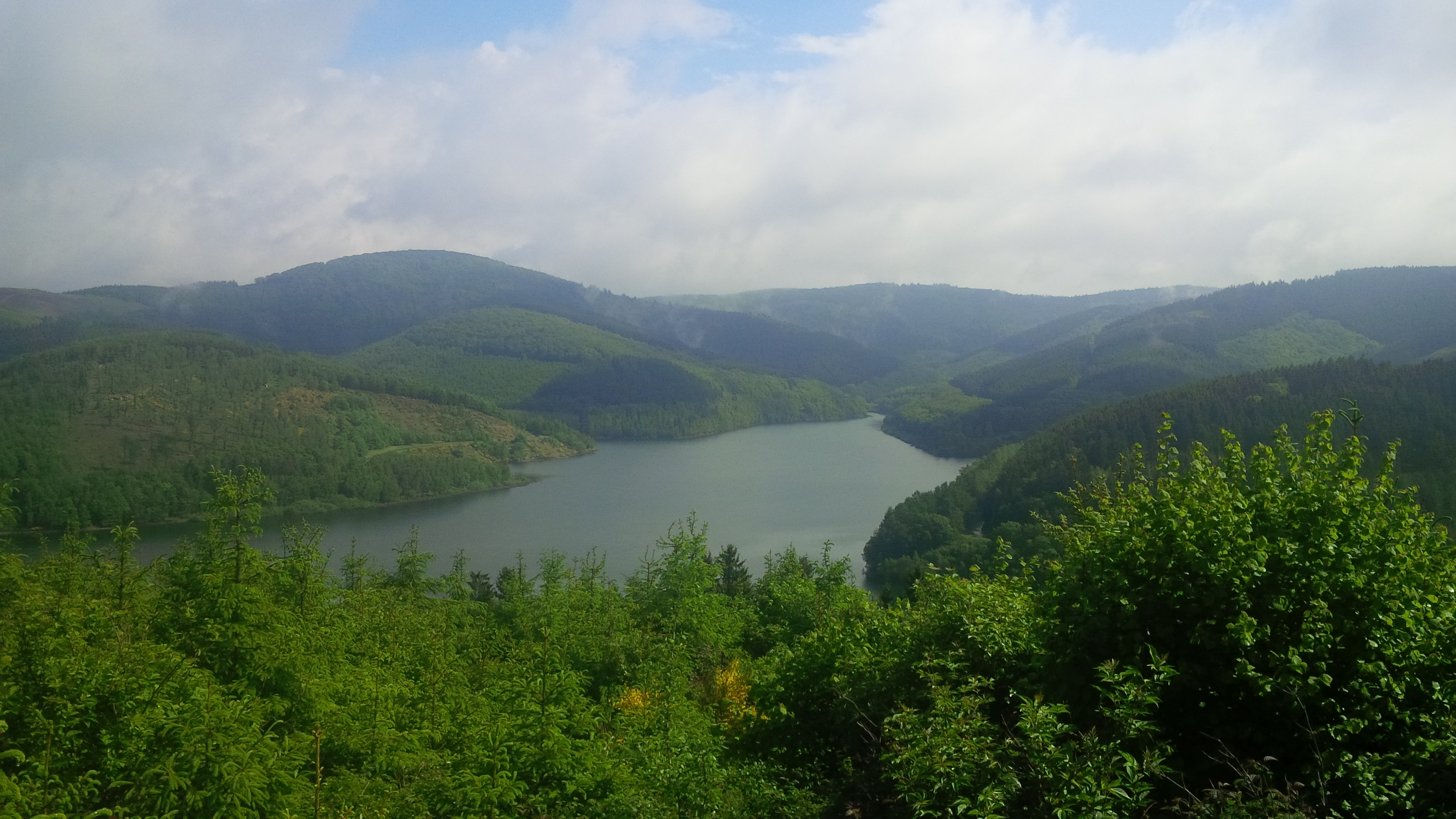 Obernau Talsperre von Süden